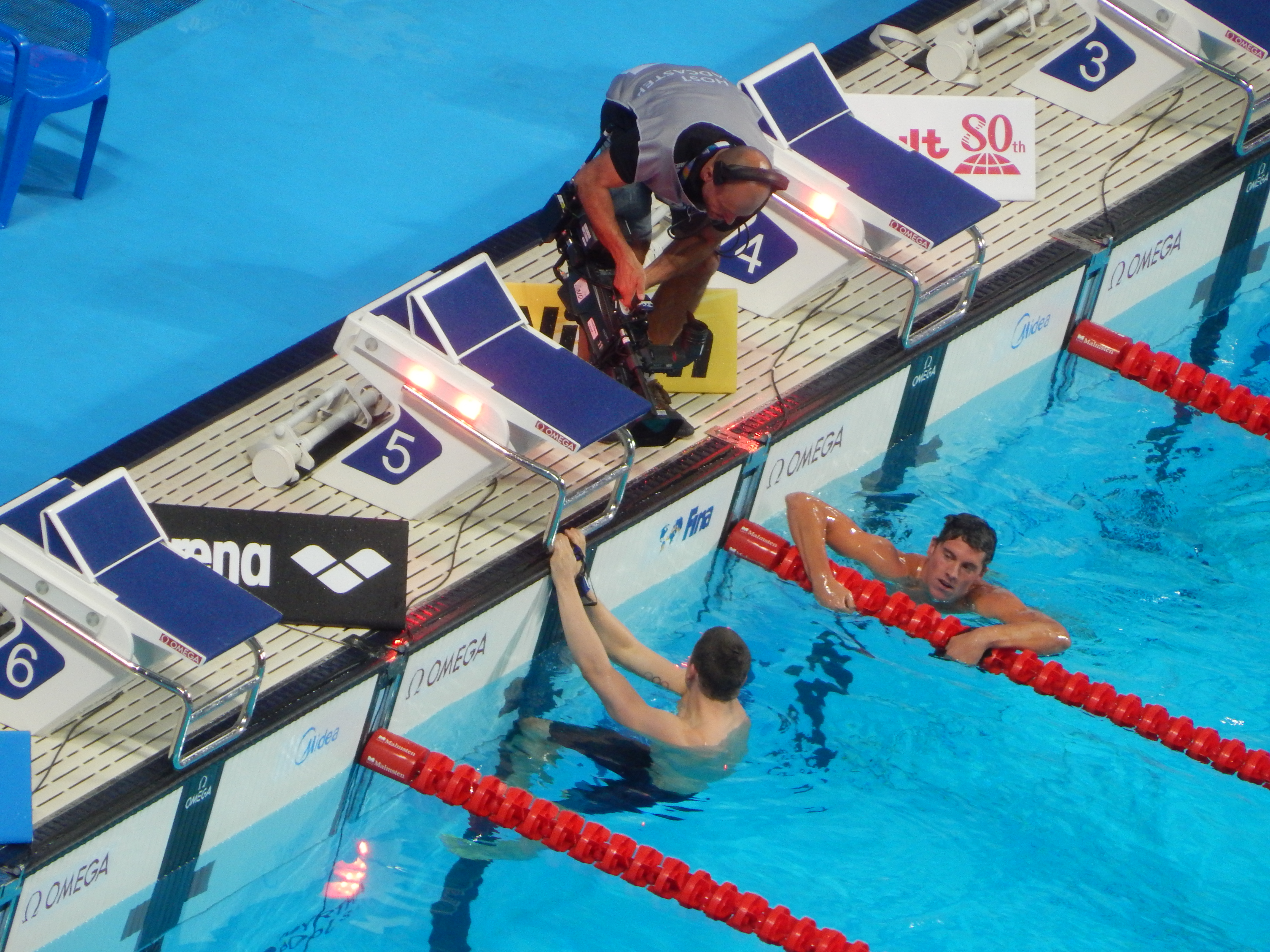 Переплывка 200 метров комплекс у мужчин